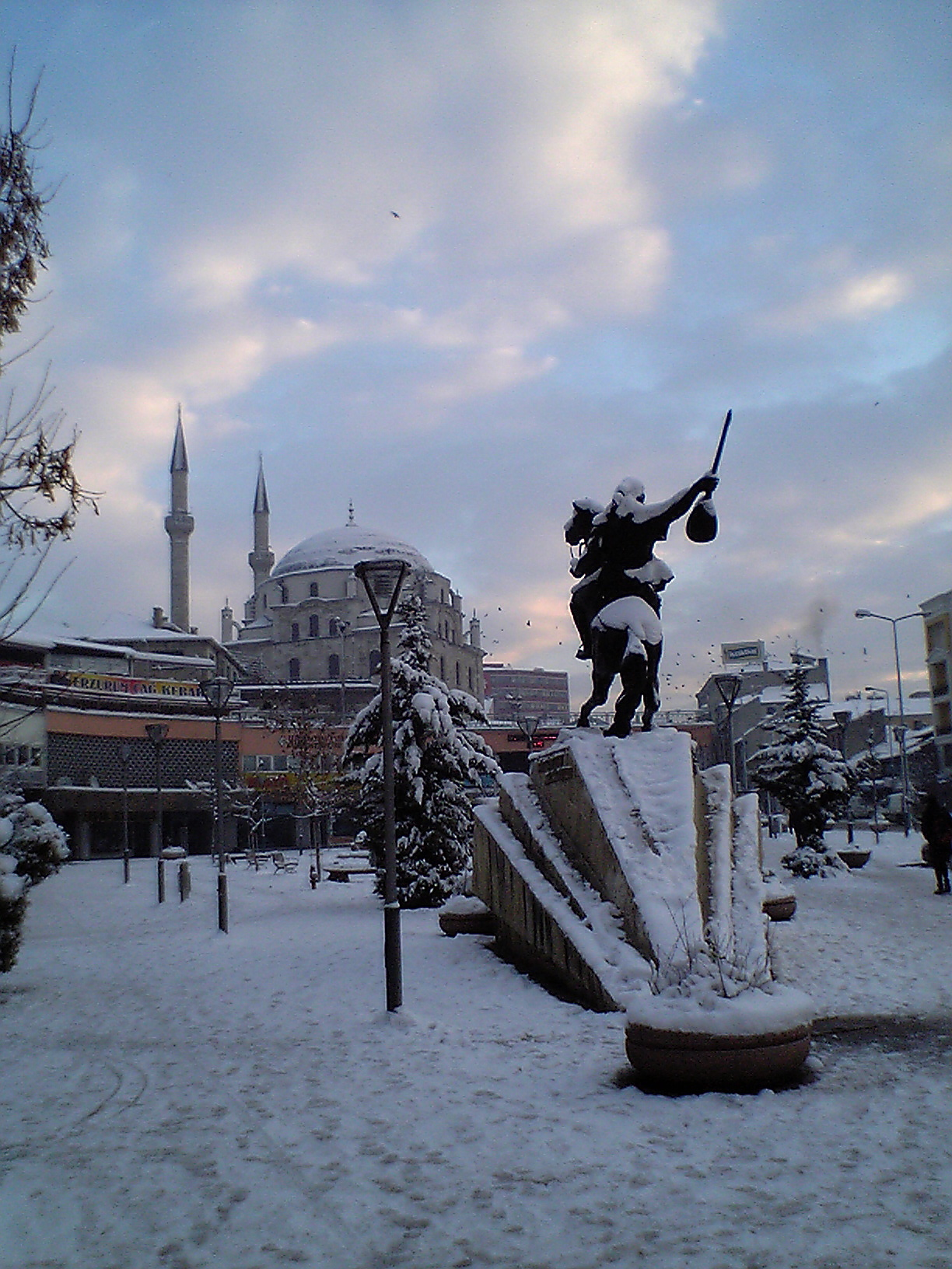 Bolu şehir merkezinde bulunan Köroğlu Anıtı. Üzerinde Türk halk kahramanlarından Köroğlu'na ithafen Selam Olsun Bolu Beyine yazmaktadır.